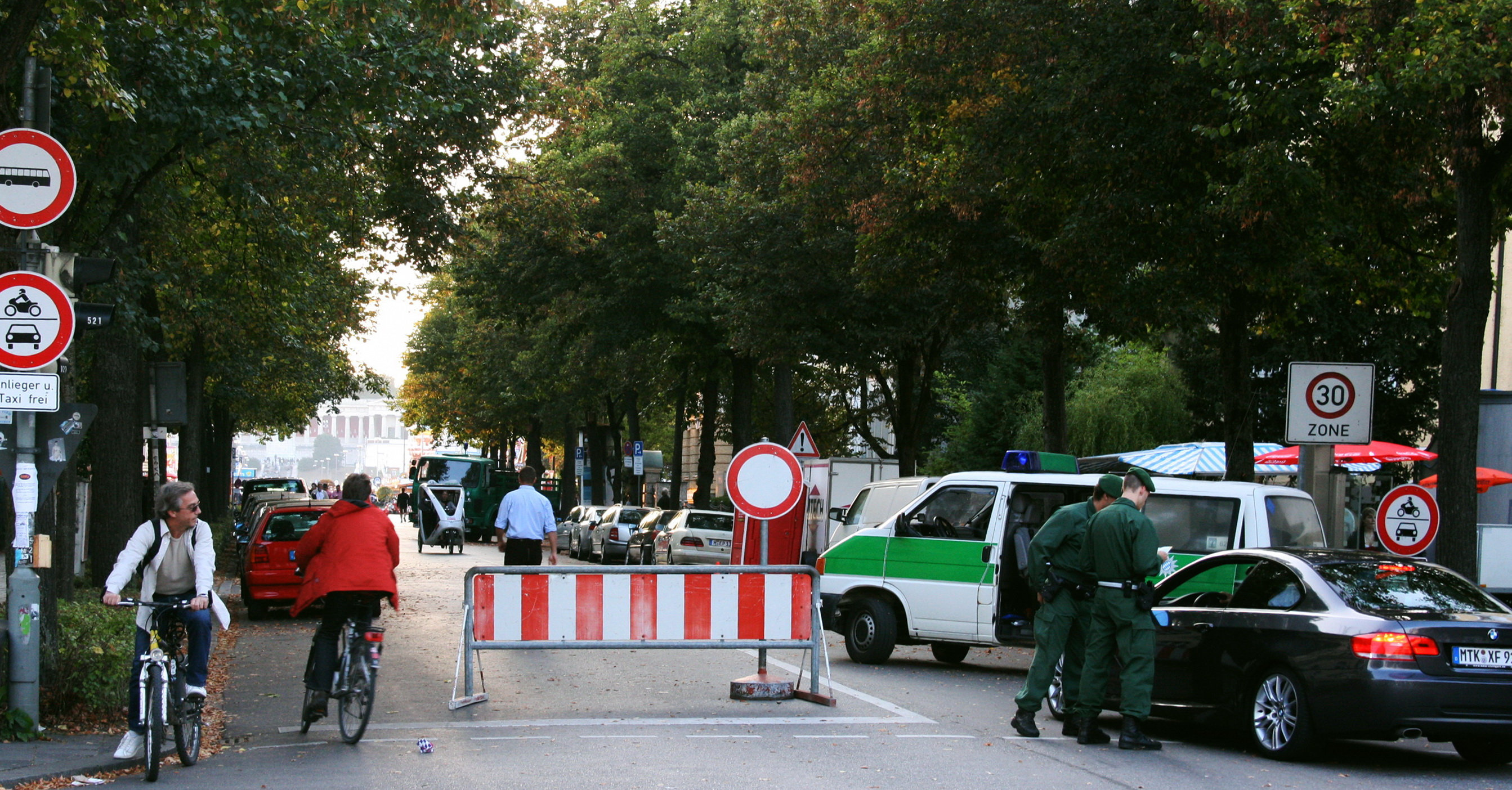 Zufahrtskontrolle am Münchner Oktoberfest. Diese wurden 2009 wegen der Ankündigung von Anschlägen durchgeführt.